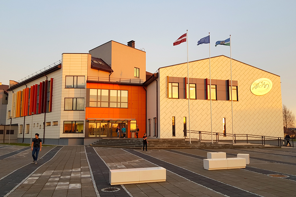 Salaspils 1. vidusskolas jaunais korpuss Ceru ielā 1